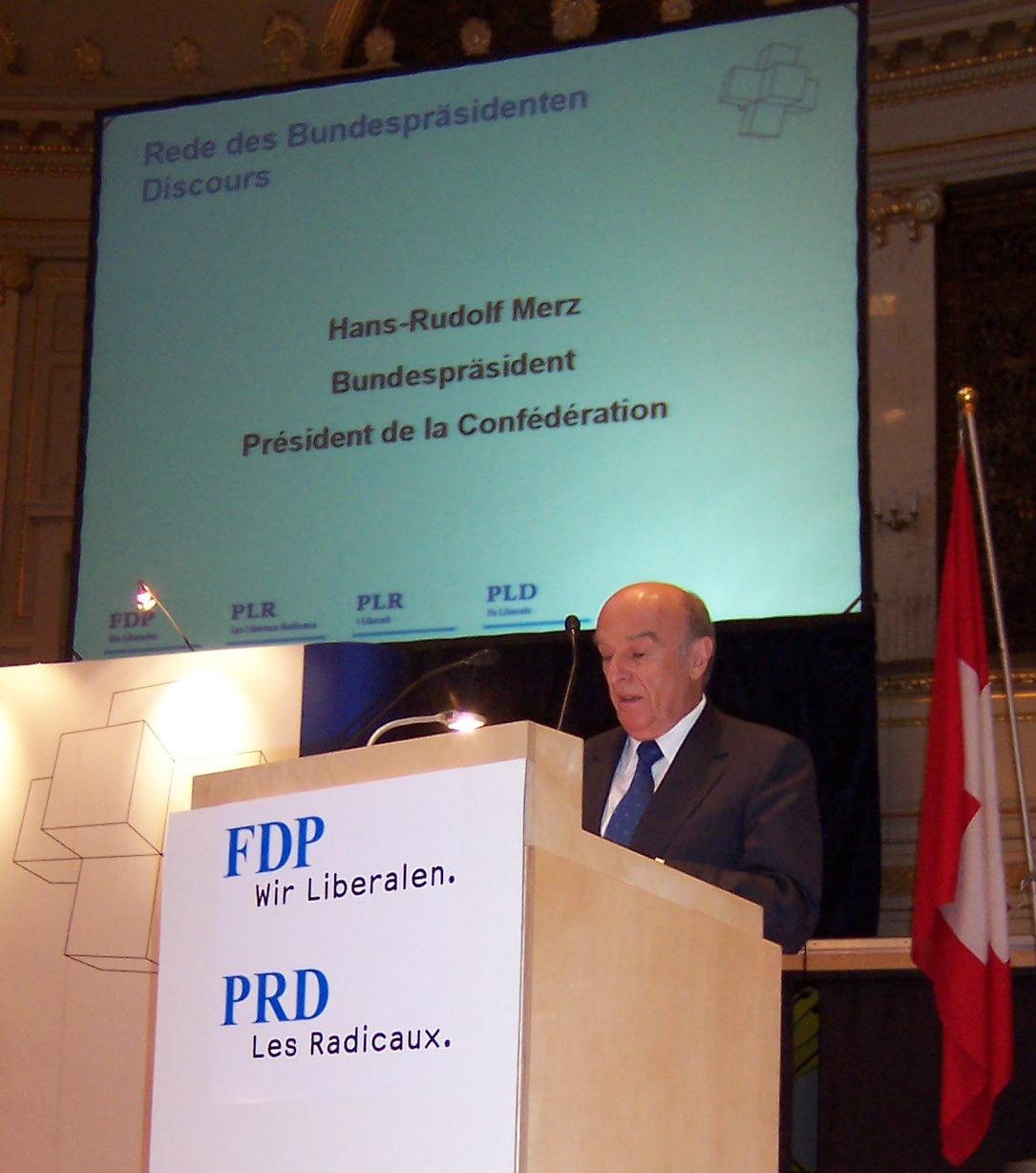 Bundespräsident Hans-Rudolf Merz redet an der Gründungs-DV der «FDP. Die Liberalen» in Bern